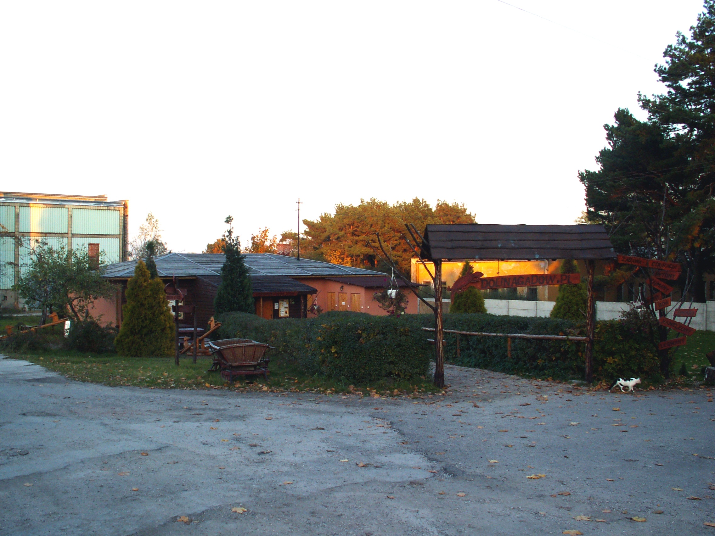 Stadion Leśny w Kielcach